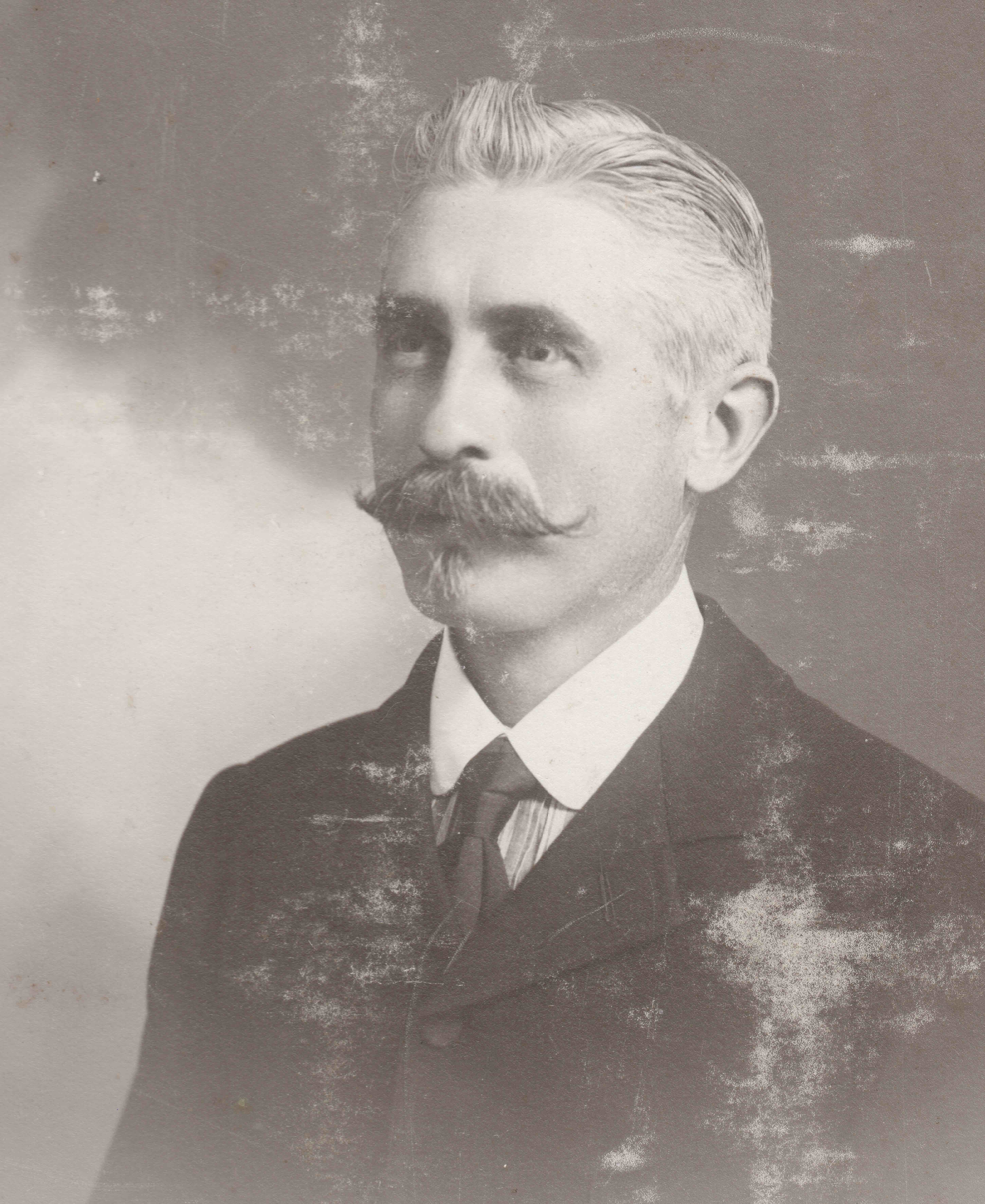 portrait Henri Gautreau, année 1902, Paris